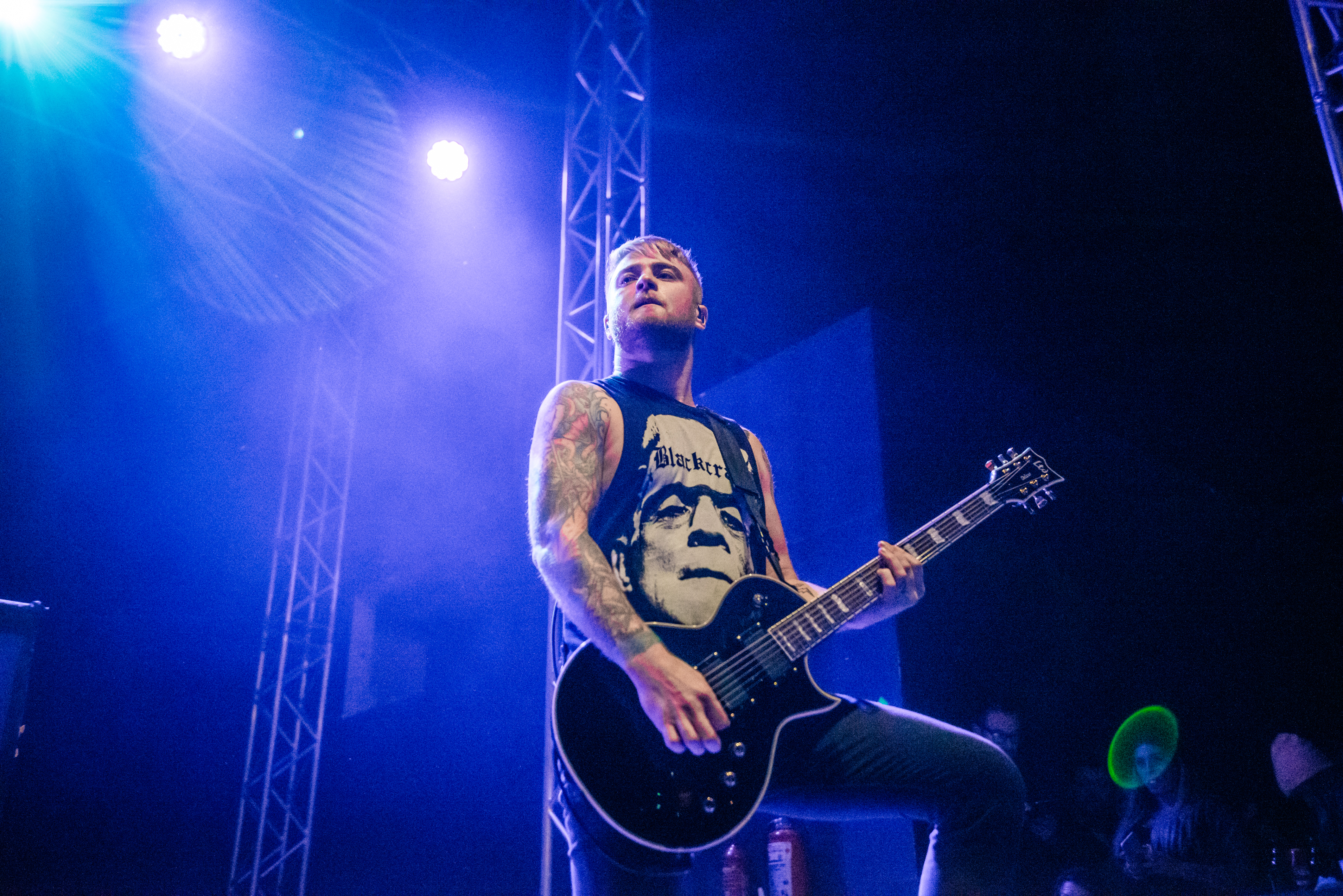 'The Amity Affliction - Impericon Never Say DIE! - Oberhausen'